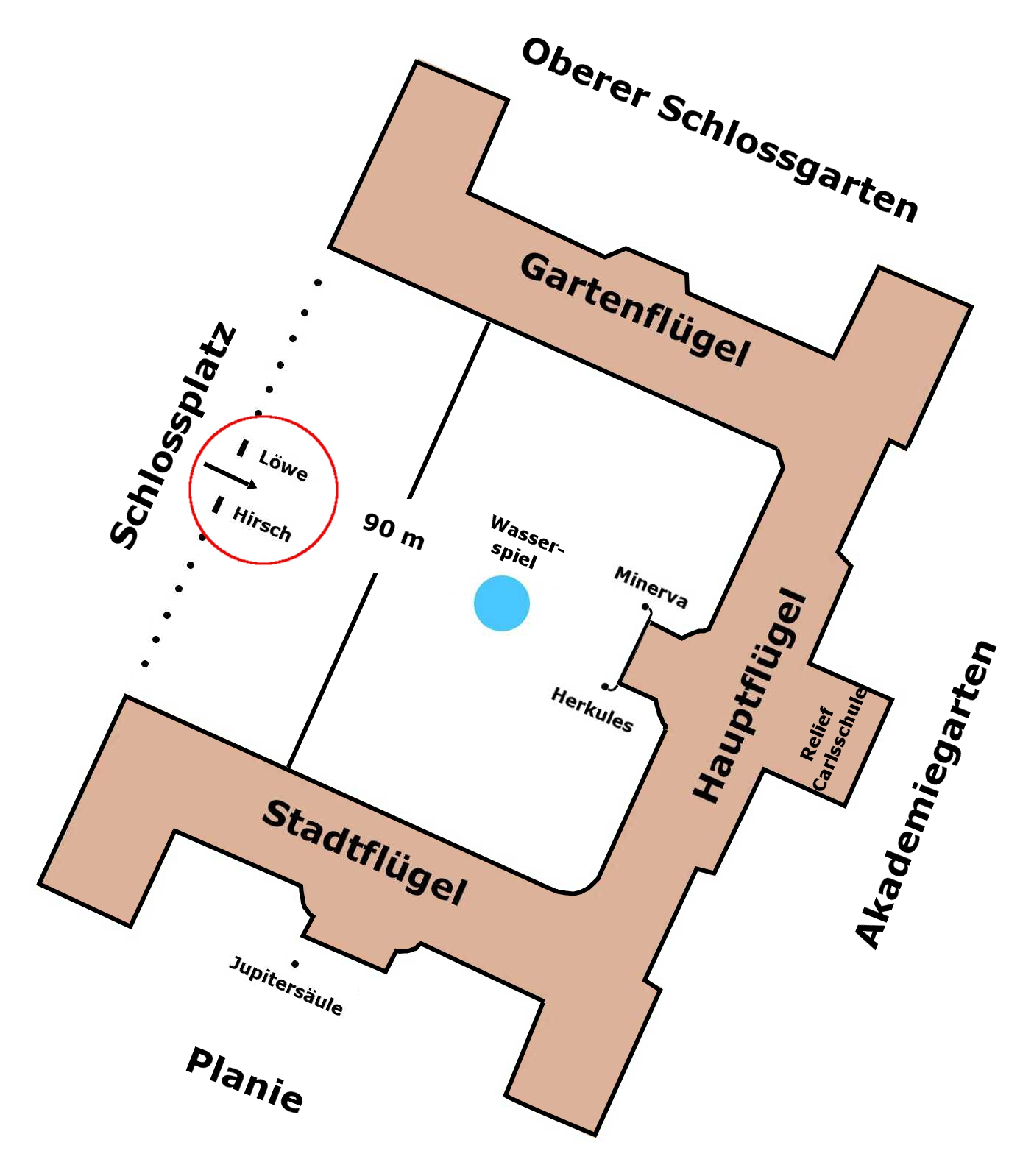 Neues Schloss Stuttgart, Schemagrundriss, Standbilder Hirsch und Löwe hervorgehoben.